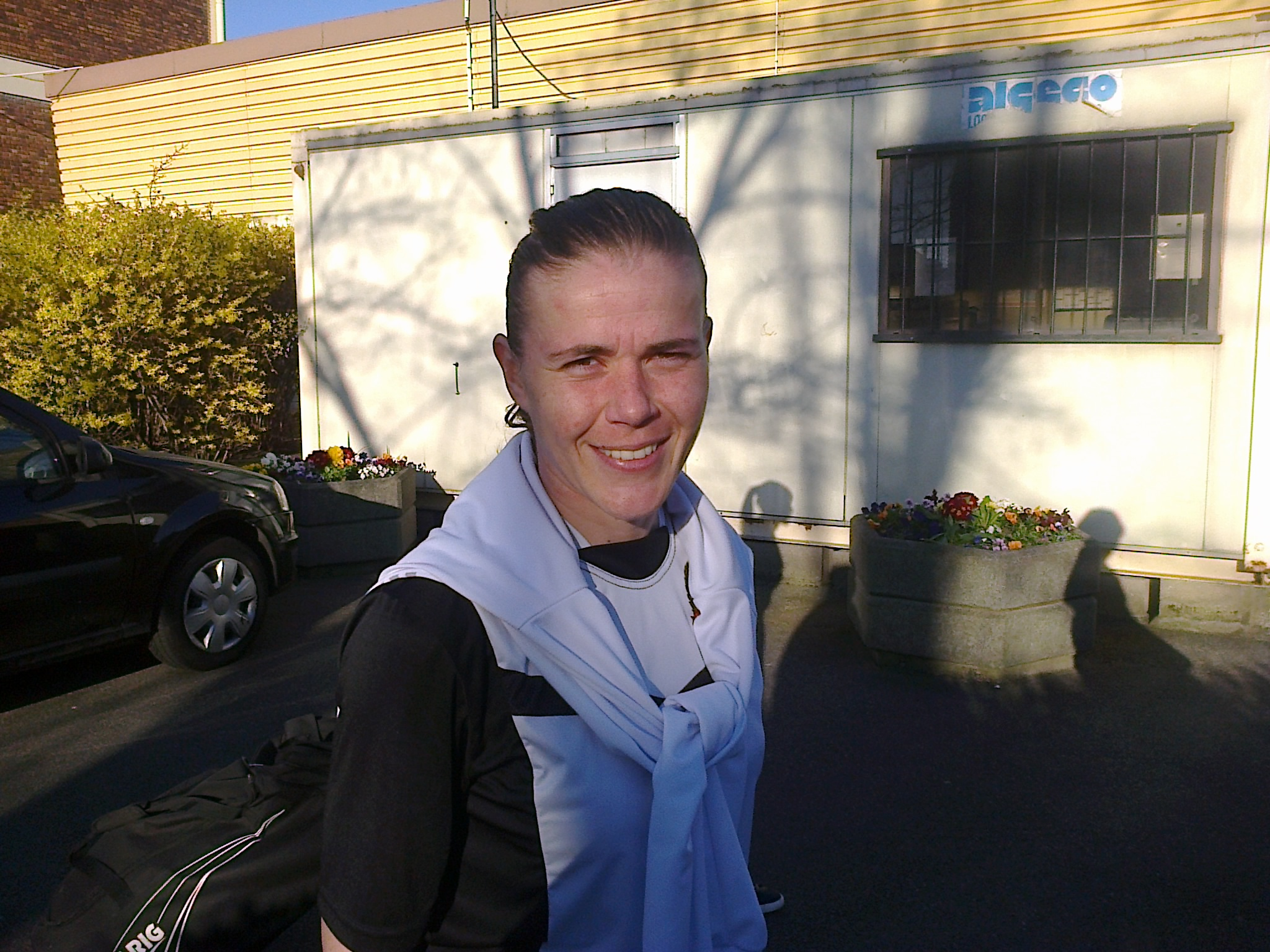 Sandrine Dusang après le match VGA Saint-Maur - Juvisy FCF du 16 mars 2014